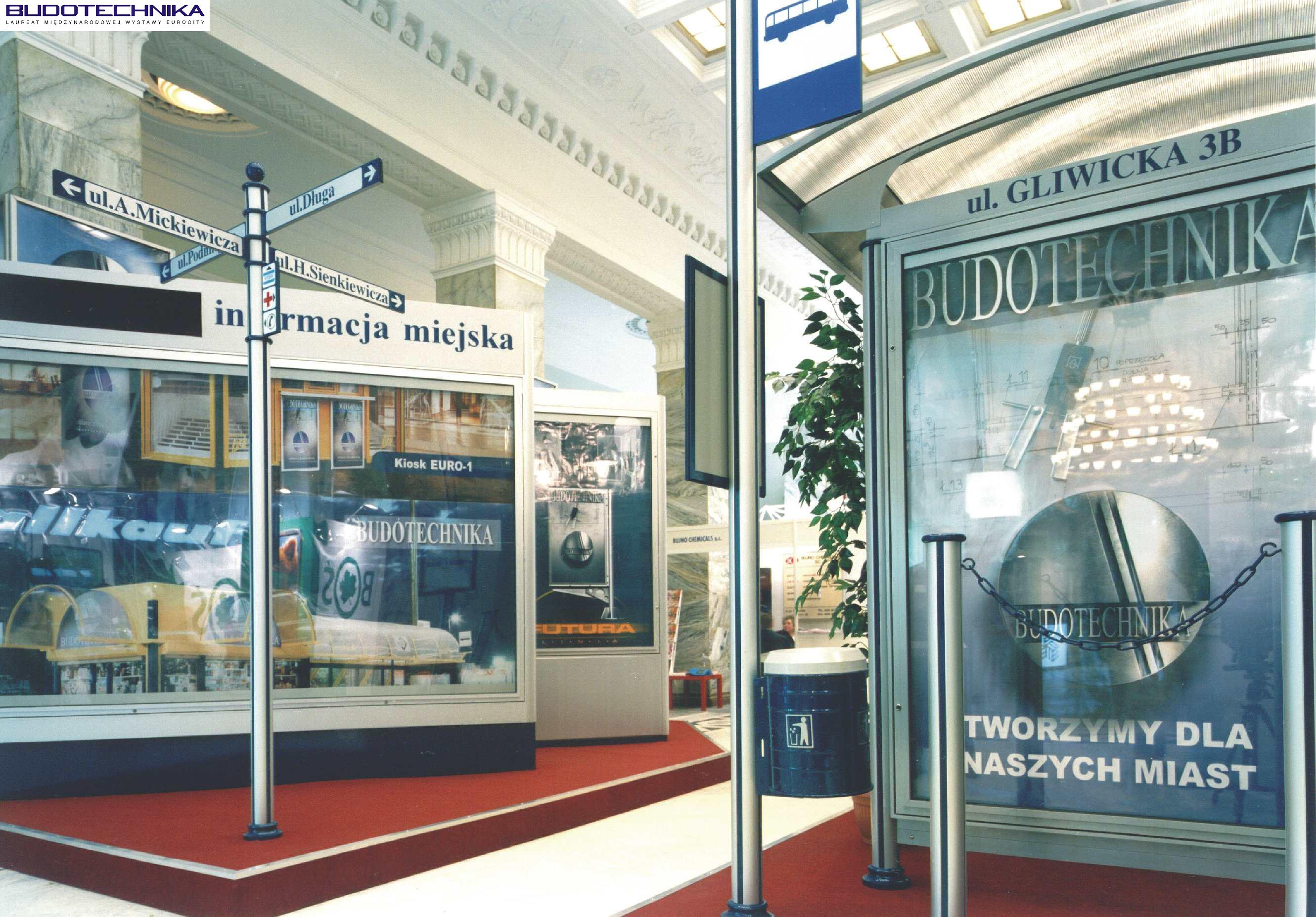 BUDOTECHNIKA-SIM-wystawa EUROCITY System Informacji Miejskiej system URBI